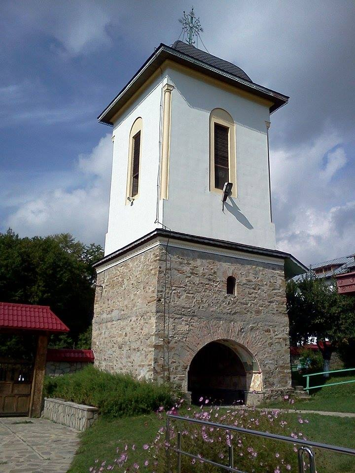 Turn clopotniță 02